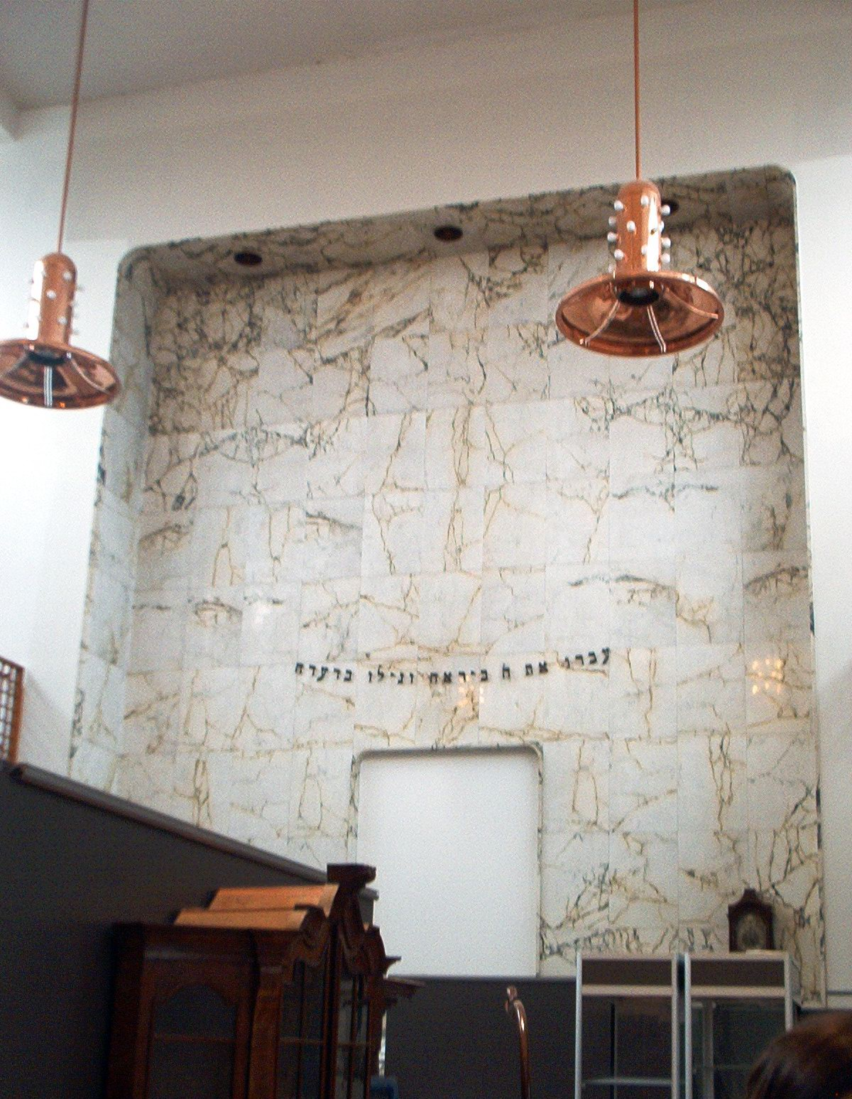 Inneres der Synagoge im Stadtteil Rivierenbuurt von Amsterdam, die von der Familie Frank besucht wurde. Heute befindet sich darin ein Auktionshaus.